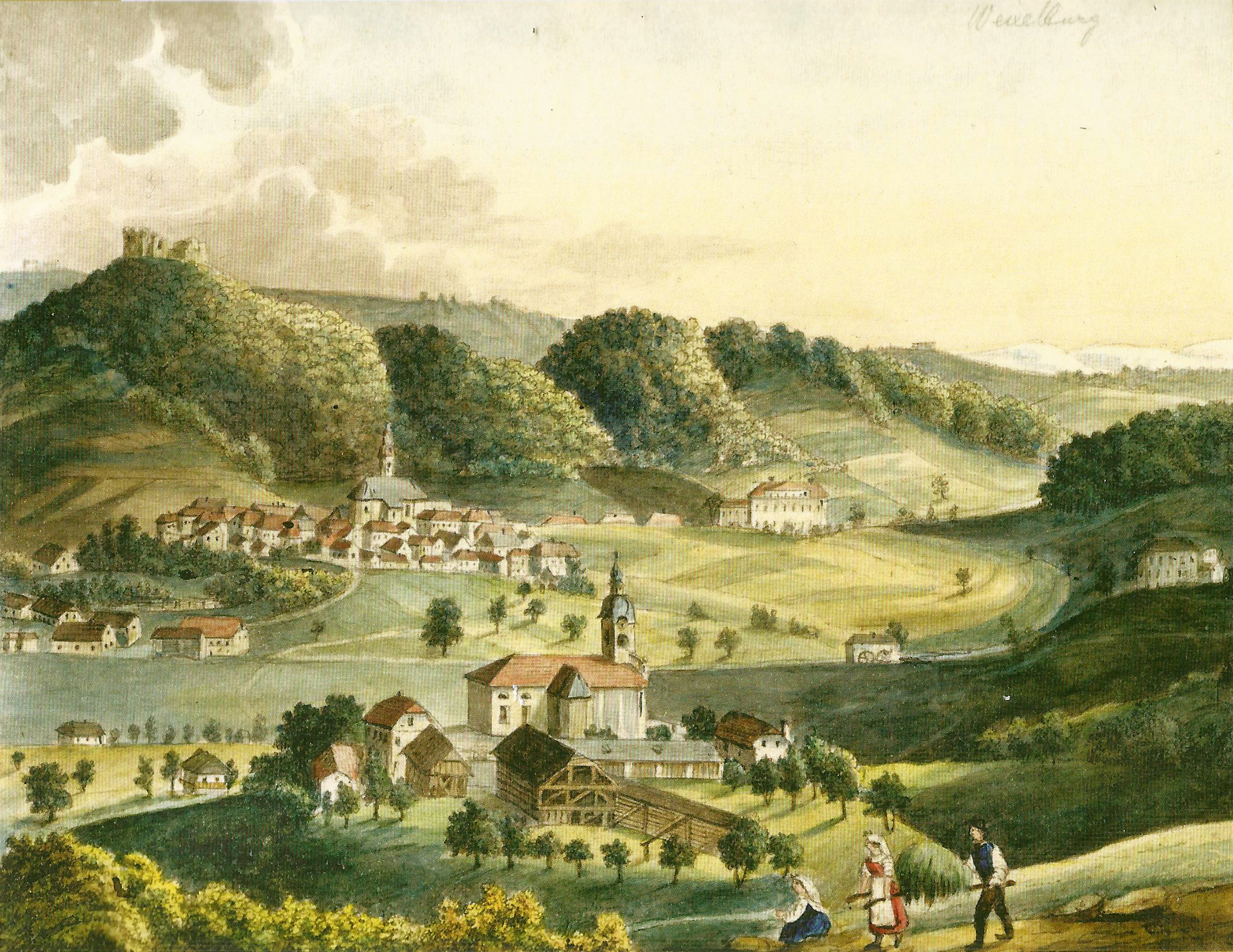 Višnja Gora leta 1864